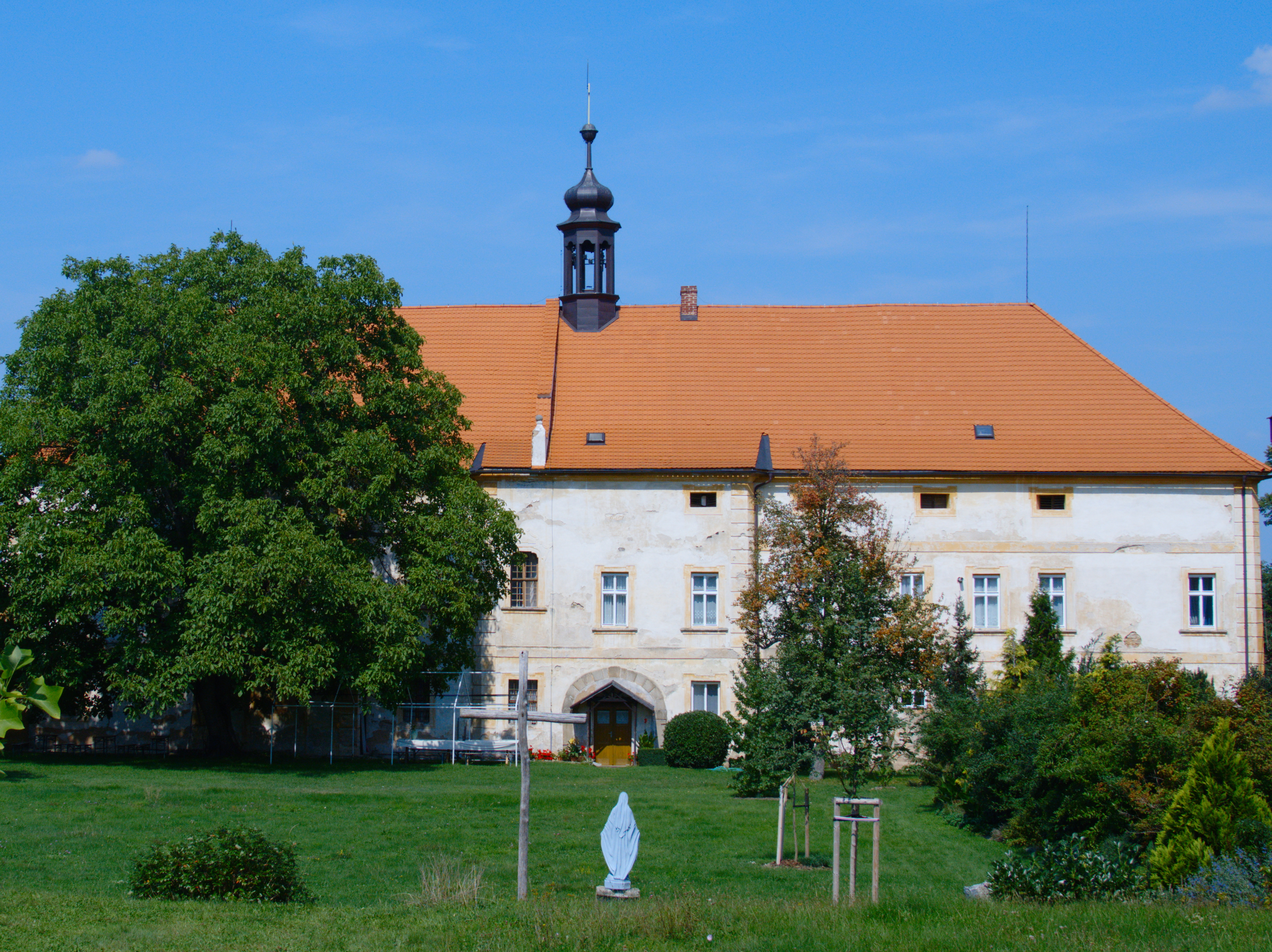 Pohled na farní dům ze zahrady 31.8.2019